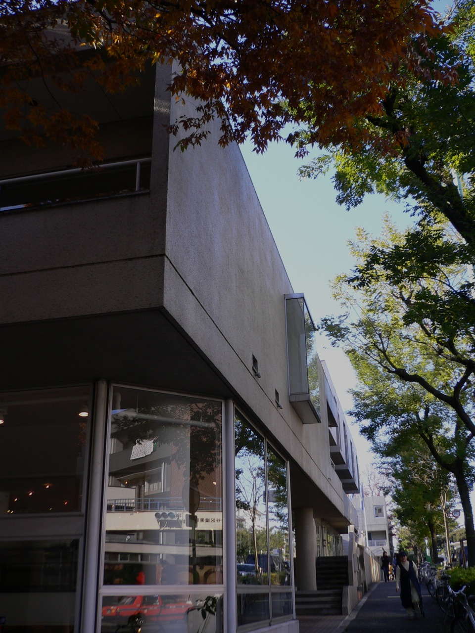 ヒルサイドテラス